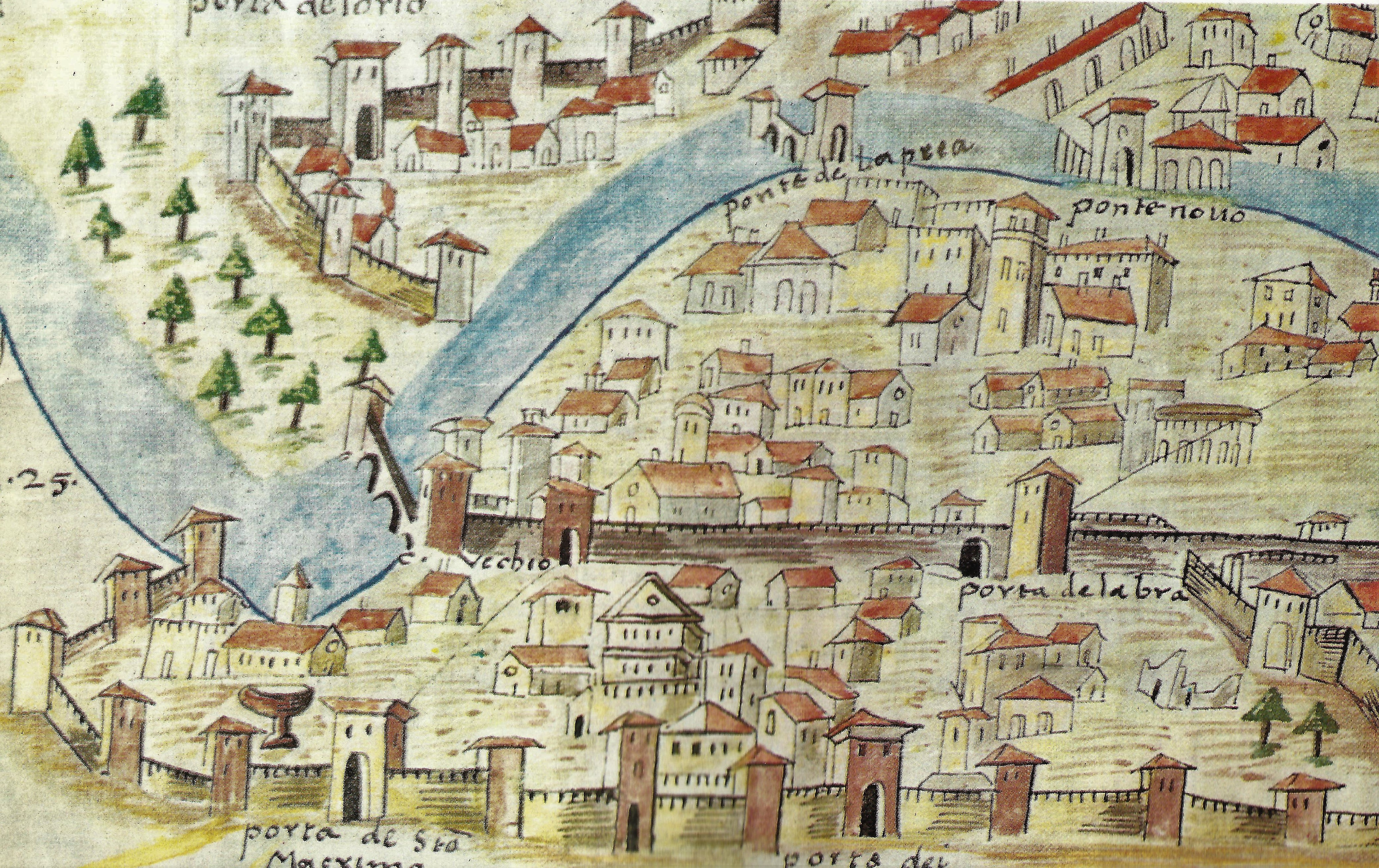 Particolare della cosiddetta Carta Almagià raffigurante la città di Veronal 1440